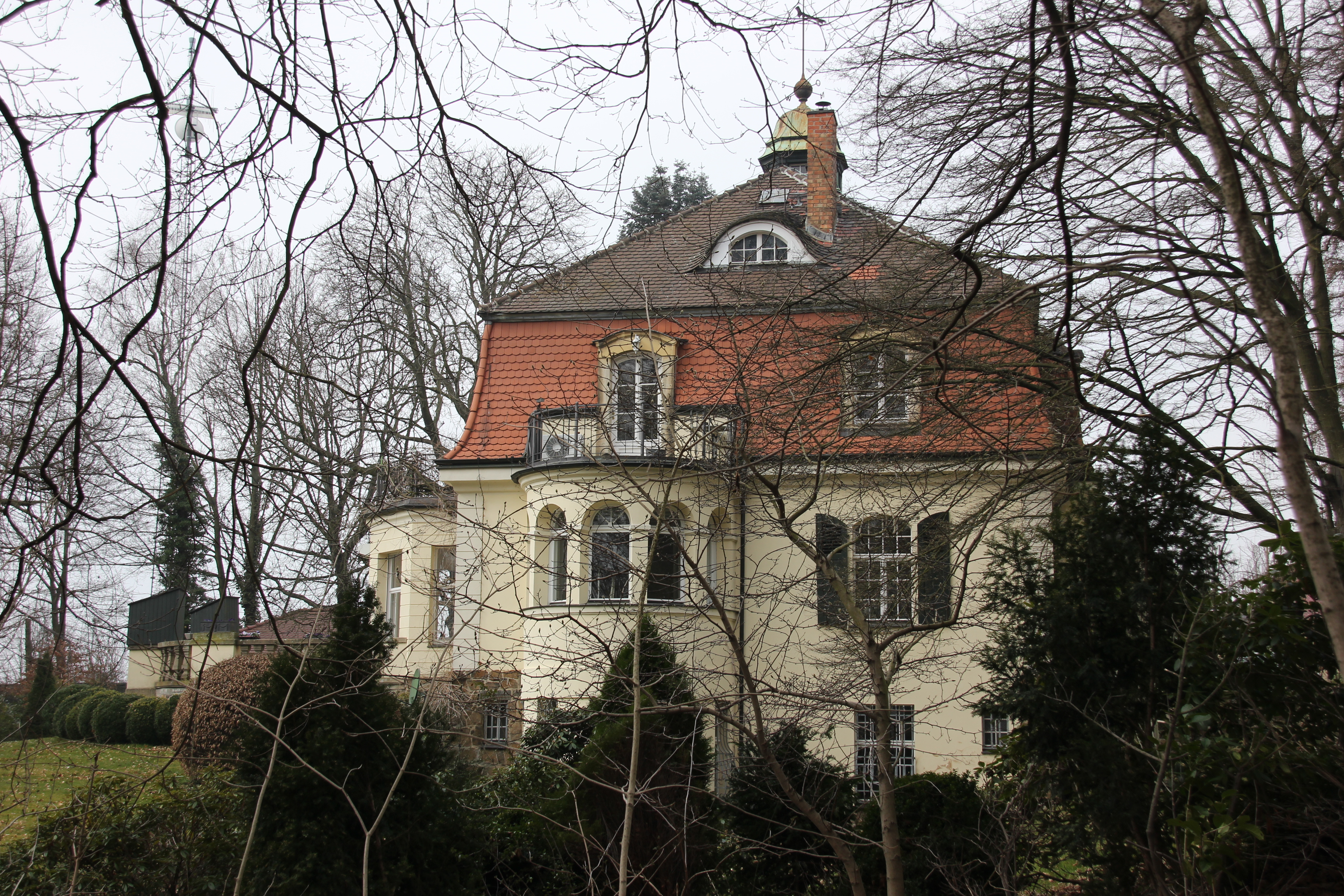 Villa Trautzschenhof